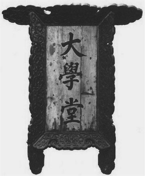 京师大学堂旧牌匾。